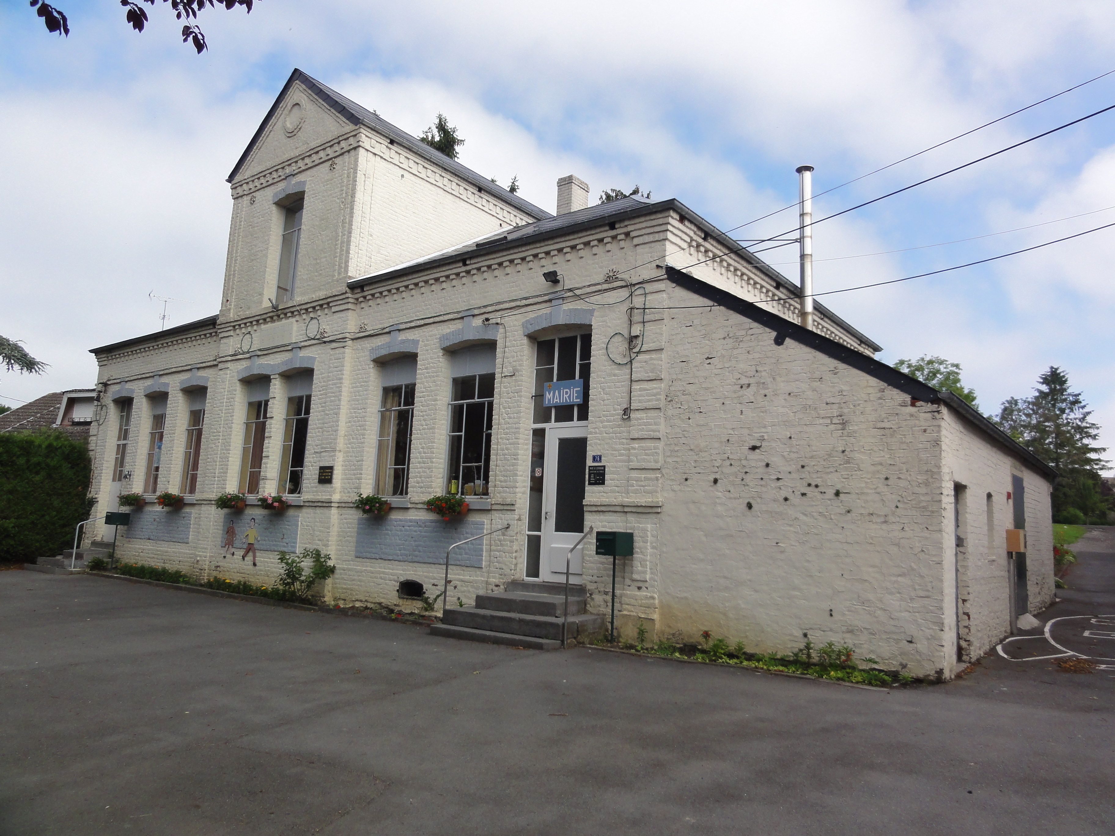 Cerfontaine (Nord, Fr) mairie-école.